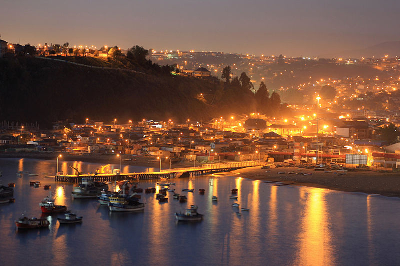 Fotografía tomada el año 2012 desde el Fuerte de Puerto Nuevo, mirando hacia la bahía de Lota. Esta fotografía fue tomada por Pablo Hernández Ormeño.